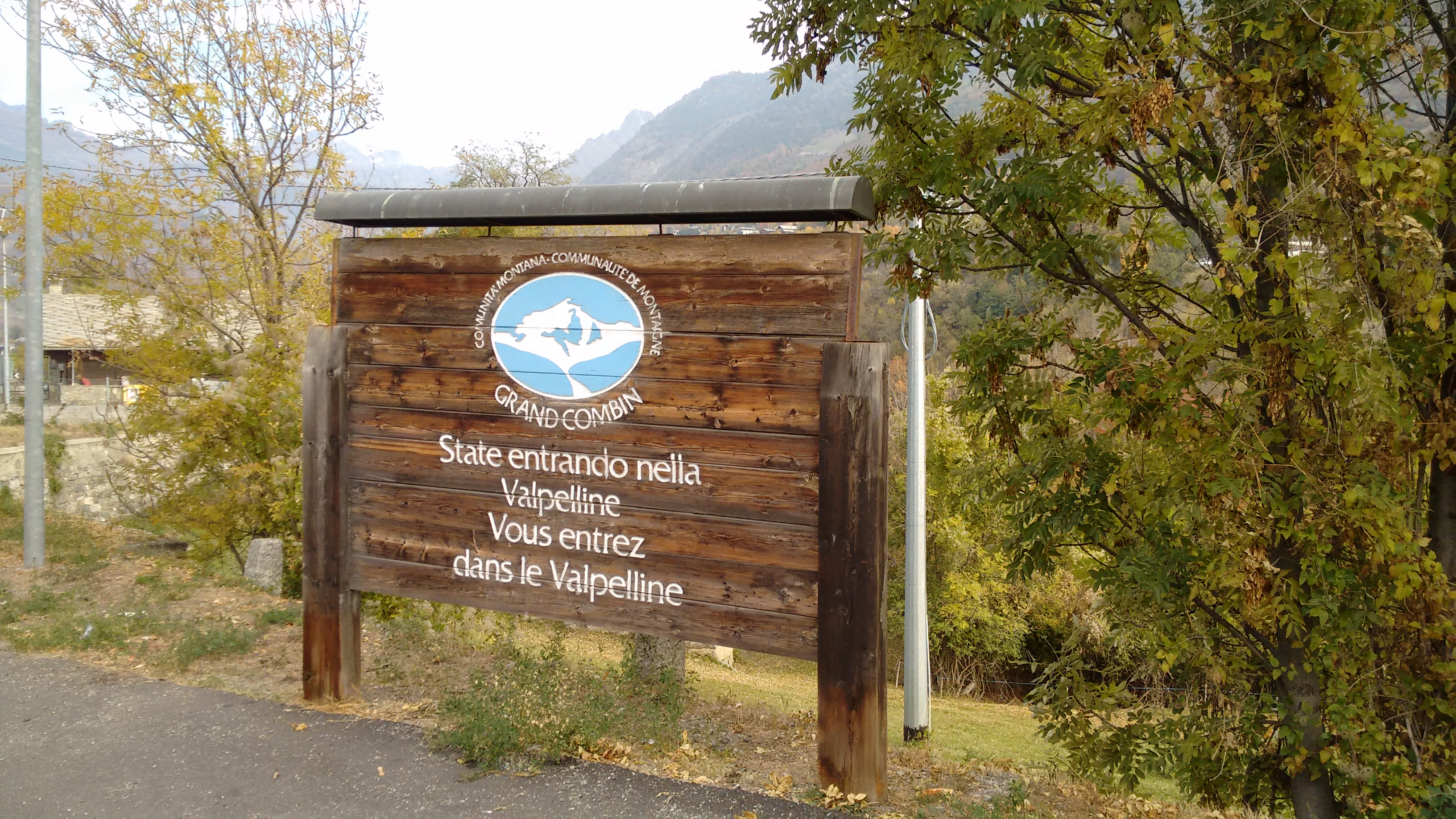 Panneau routier à l'entrée de la Communauté de montagne Grand-Combin, à Roisan (Vallée d'Aoste)